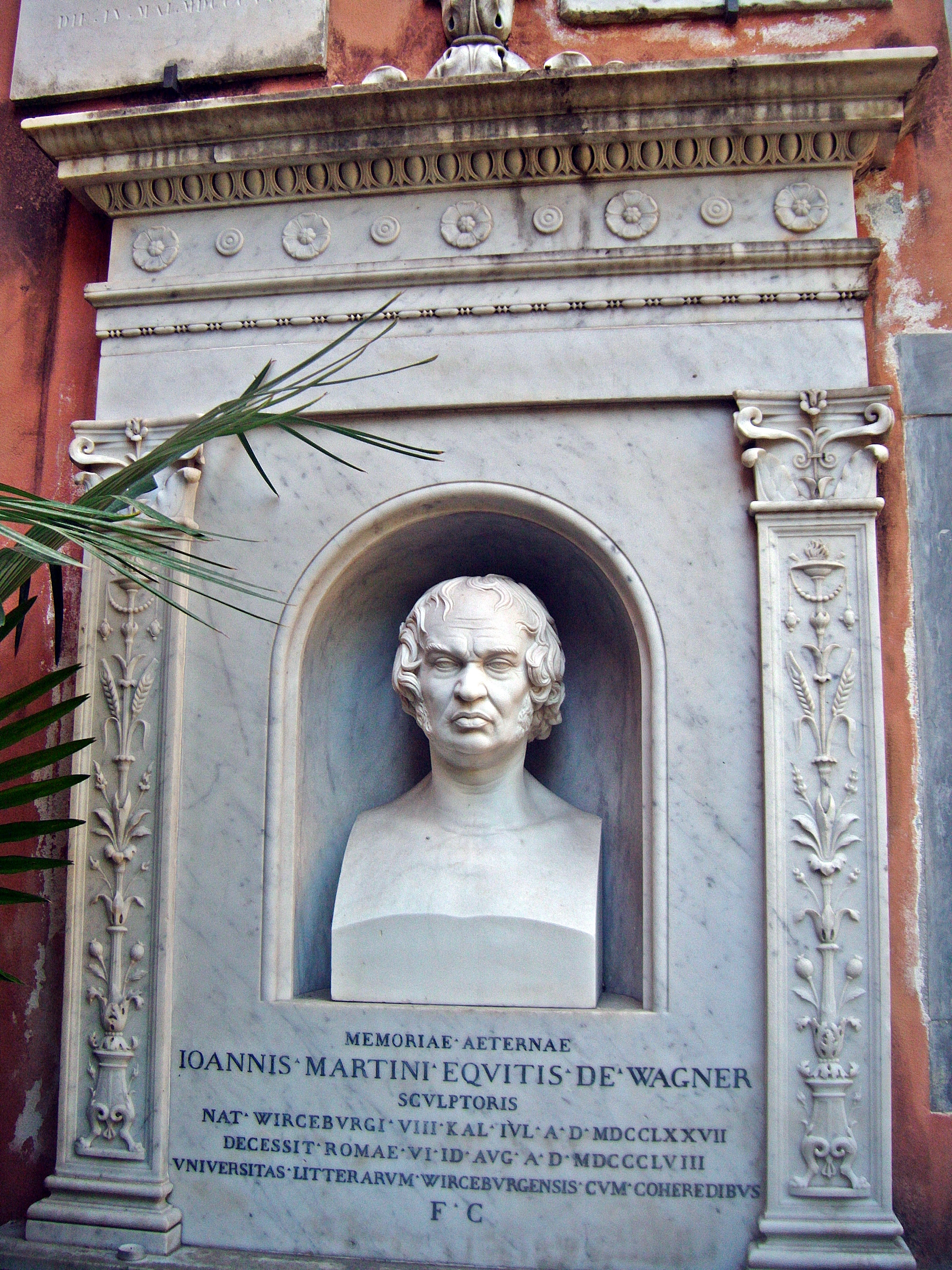 Grab von Johann Martin von Wagner, Campo Santo Teutonico, Rom